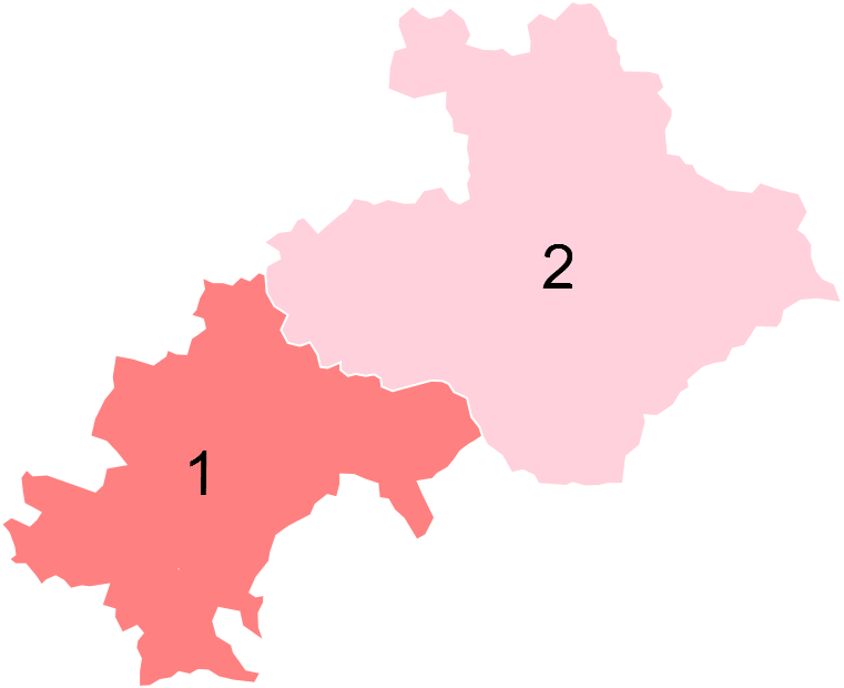 Résultats des élections législatives des Hautes-Alpes en 2012